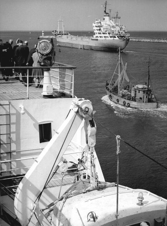 Warnemünde, Hafen Zentralbild_Link 8.6.1967 Rostock: Vor dem Auslaufen in der Warnemünde In wenigen Wochen wird ein reger Schiffsverkehr in der Warnemündung zu beobachten sein, wenn die Gäste aus den Anliegerstaaten zur Teilnahme an der X. Ostseewoche eintreffen werden.